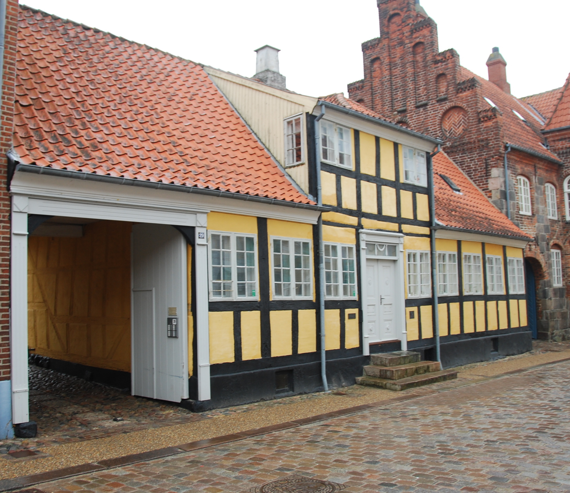 Den fredede bygning "Konrektors Gård" i Viborg.